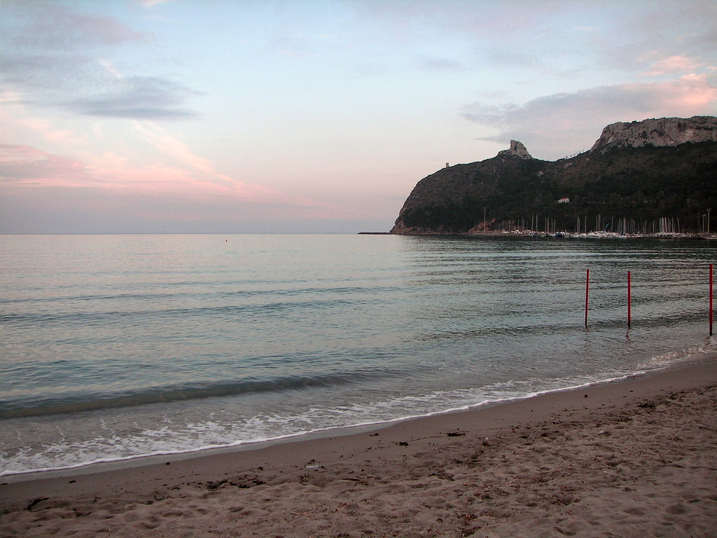 Cagliari, Sardegna, Italia